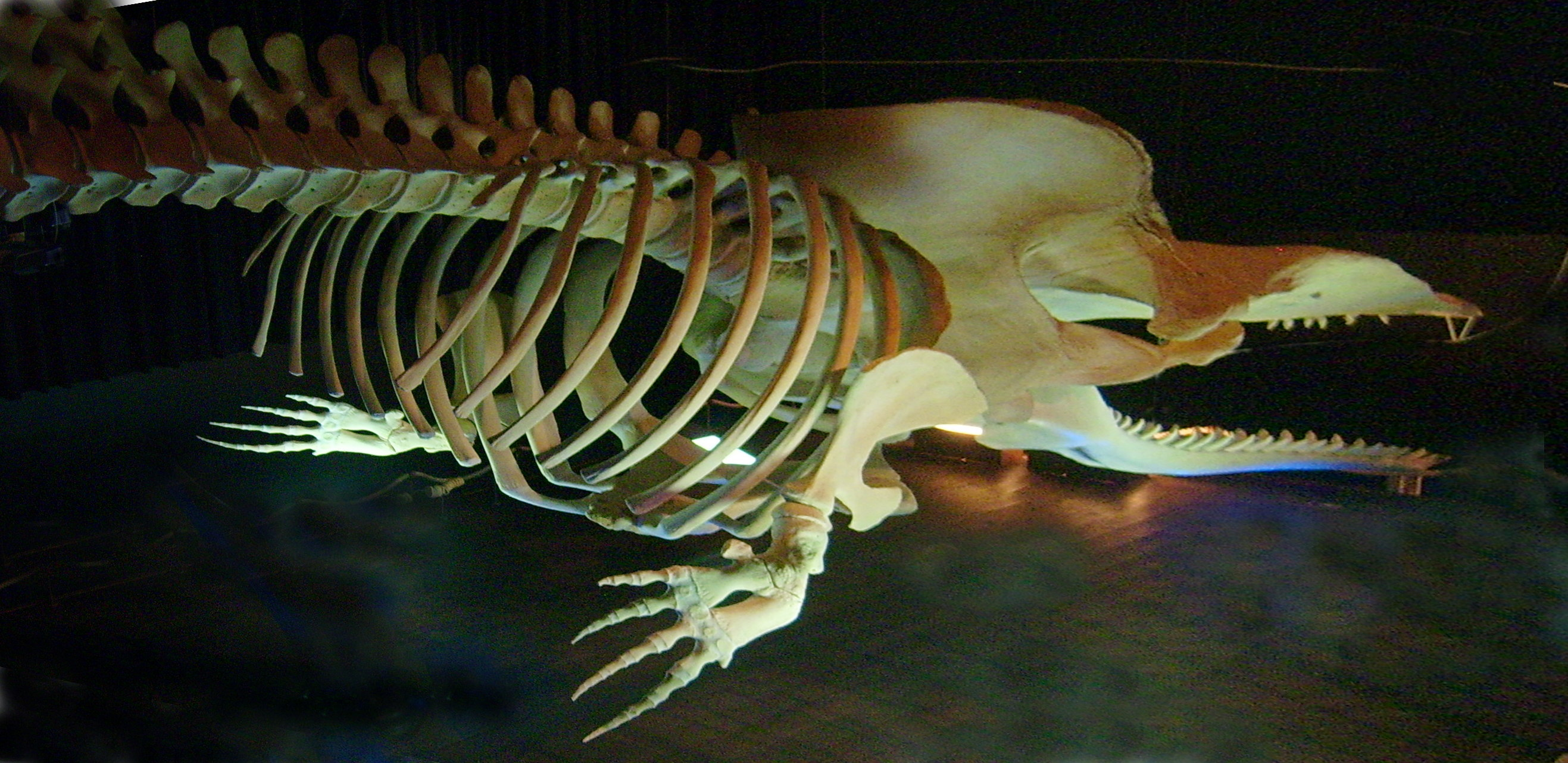 Walskelet im Waloseum